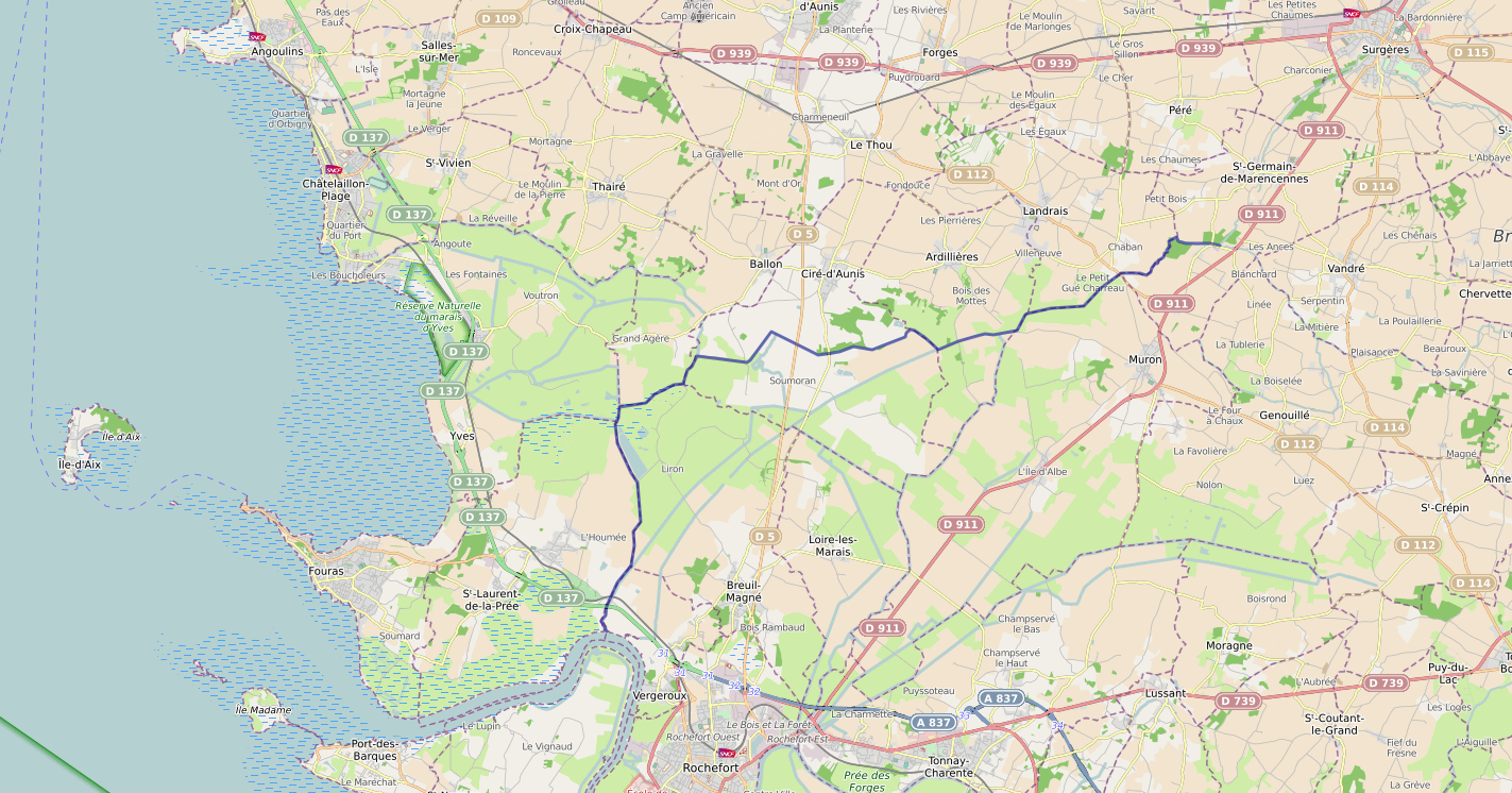 Le canal de Charras en Charente-Maritime (France)